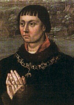 Fragment uit zeventiende-eeuws schilderij van onbekende schilder. Het origineel staat op